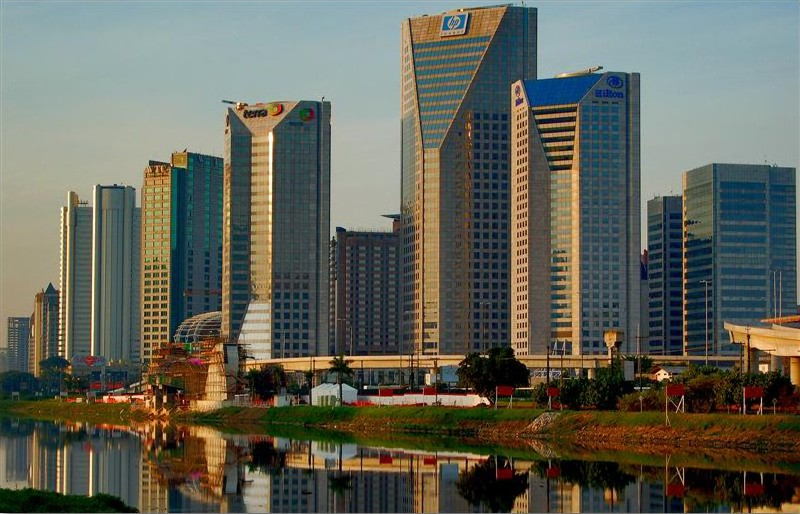 Landscape by Pinheiros river in São Paulo, Brazil